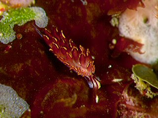 Hermaea noto, Parque Marino de Izu, Japón